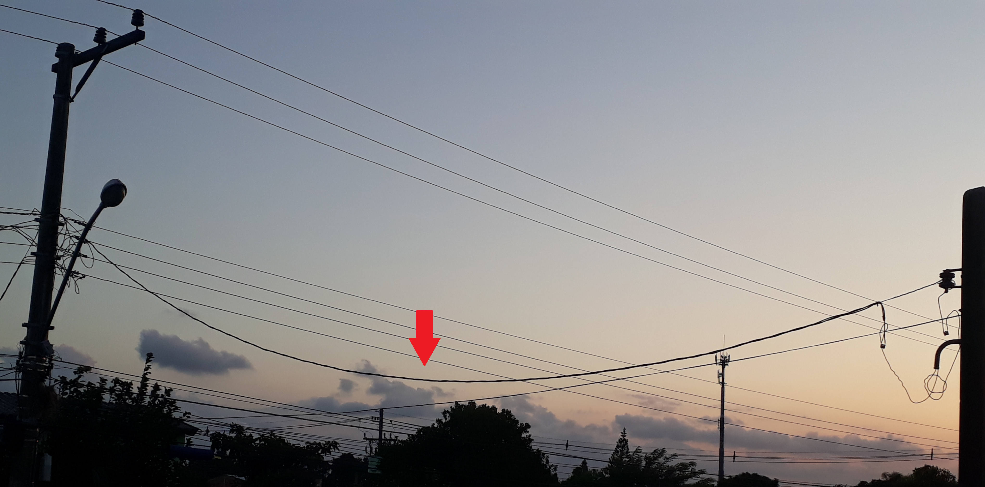 Catenária (indicada pela seta) formada por cabo suspenso de transmissão elétrica entre postes.